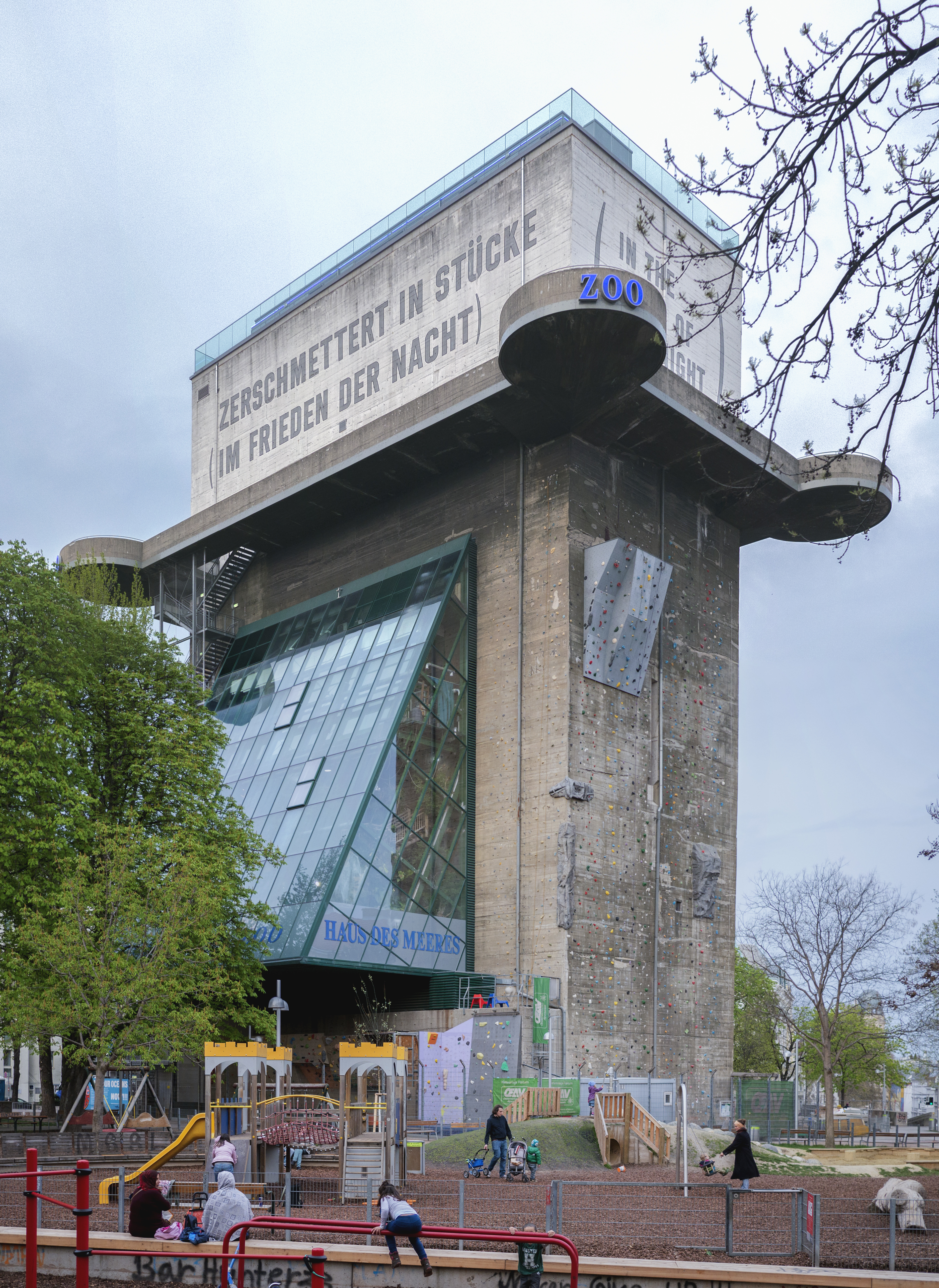 Haus des Meeres